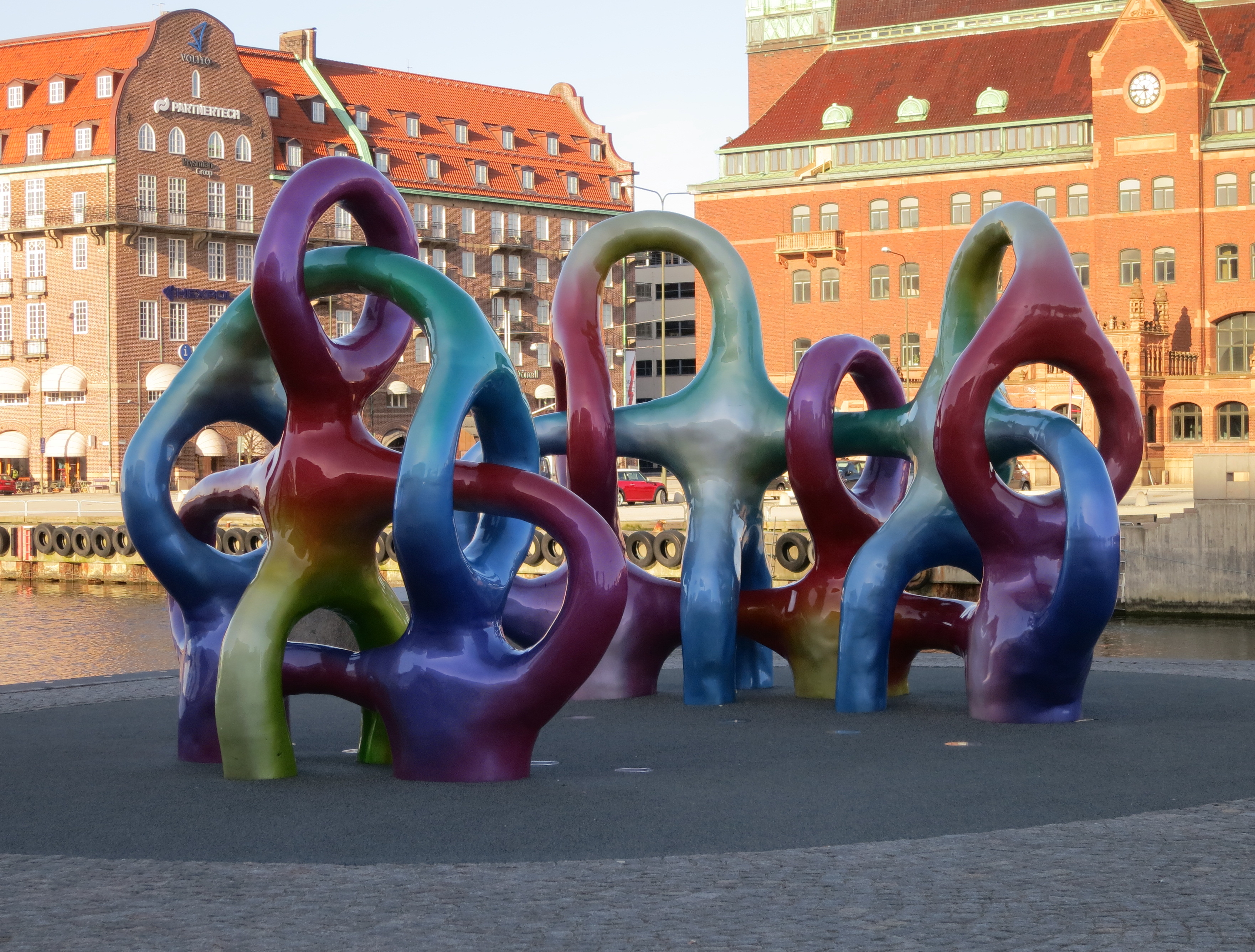 Spectral self container av Matti Kallionen, skulptur i Malmö